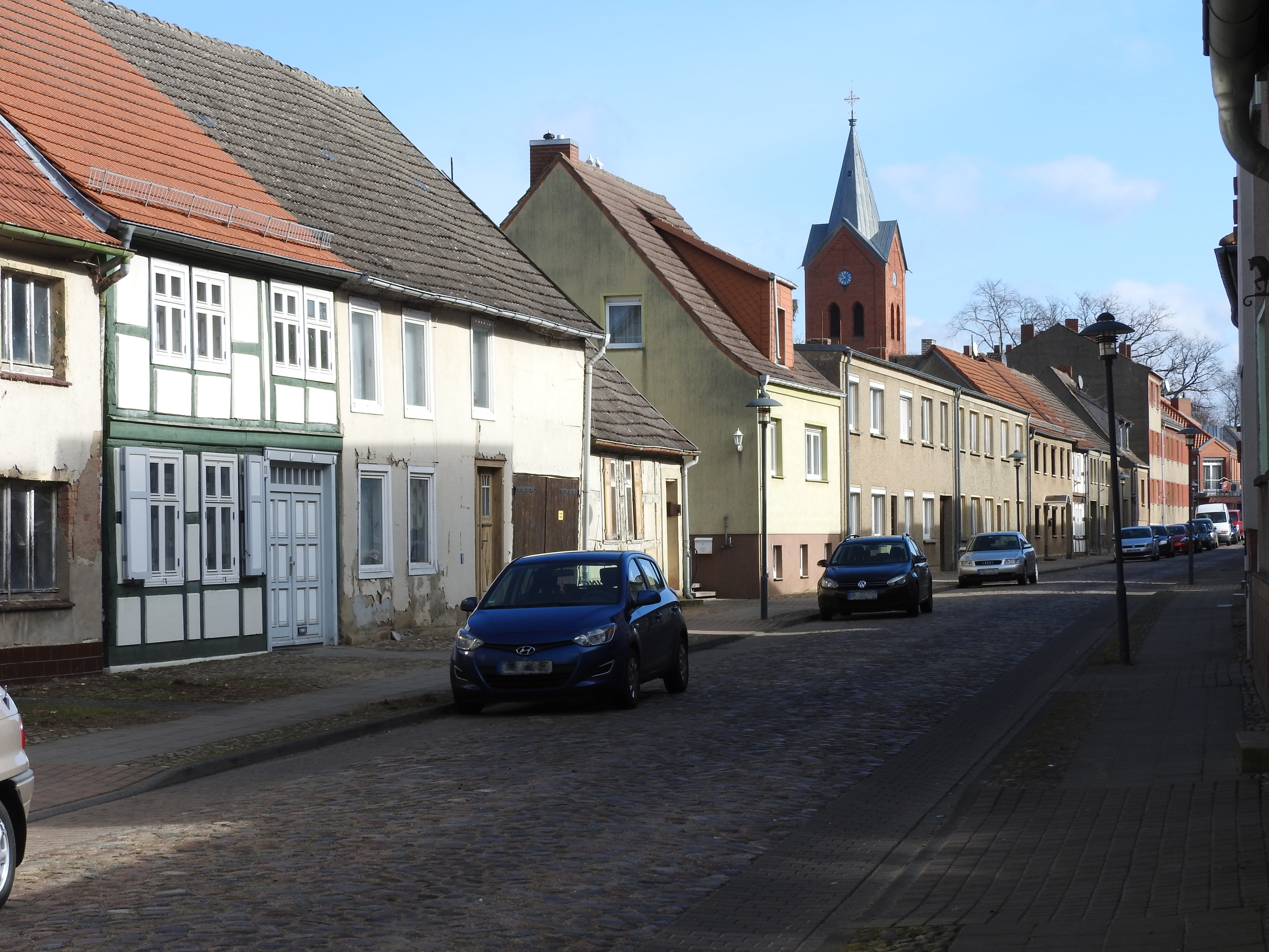 Meyenburg, 15.03.2016